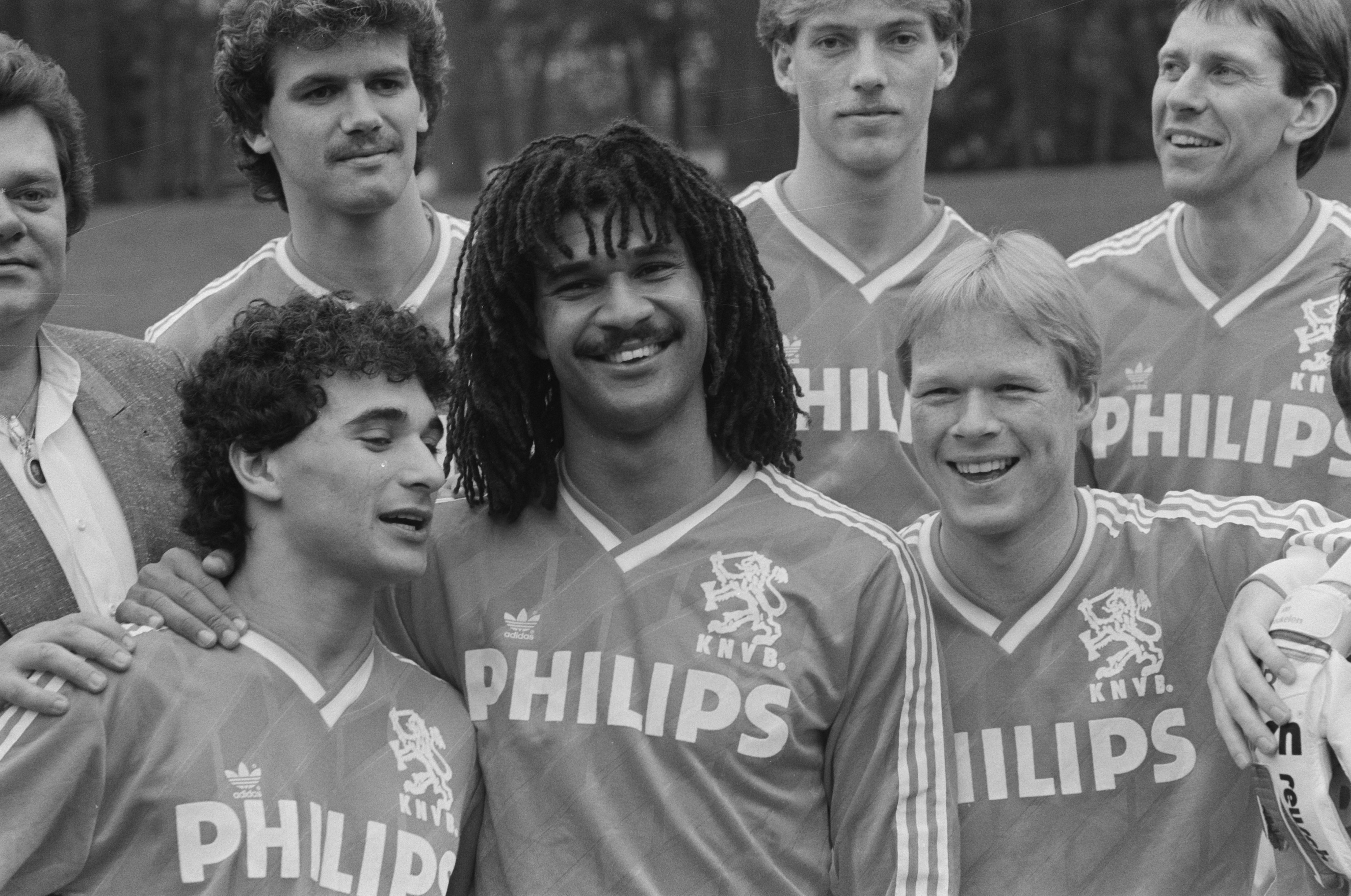 Collectie / Archief : Fotocollectie Anefo Reportage / Serie : [ onbekend ] Beschrijving : Selectie Nederlands elftal in Zeist; v.l.n.r. Vanenburg, Gullit, R. Koeman Datum : 21 maart 1988 Locatie : Utrecht, Zeist Trefwoorden : sport, voetbal Persoonsnaam : Gullit, Koeman, Ronald, Vanenburg, Gerald Fotograaf : Croes, Rob C. / Anefo Auteursrechthebbende : Nationaal Archief Materiaalsoort : Negatief (zwart/wit) Nummer archiefinventaris : bekijk toegang 2.24.01.05 Bestanddeelnummer : 934-2147